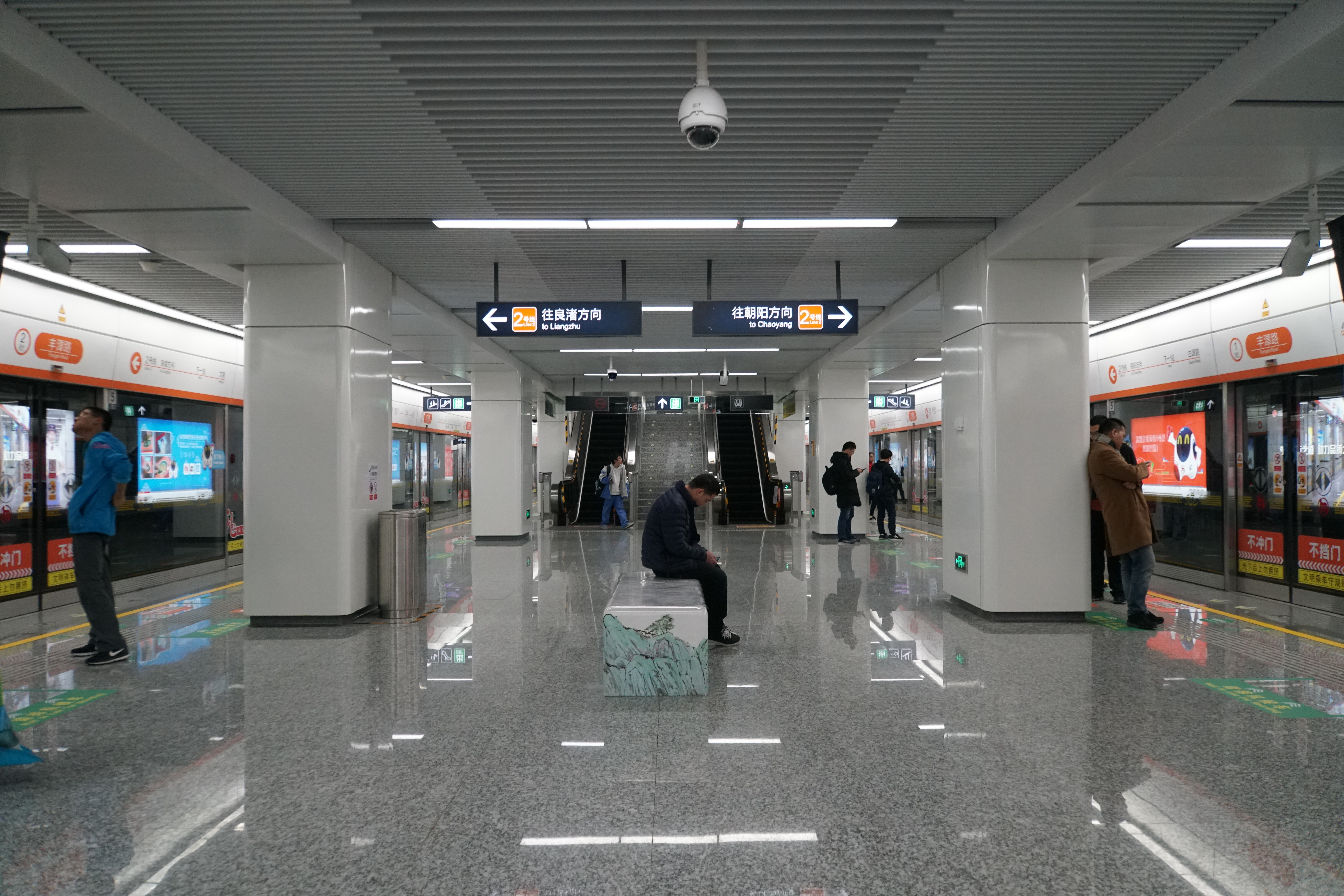 丰潭路站站台